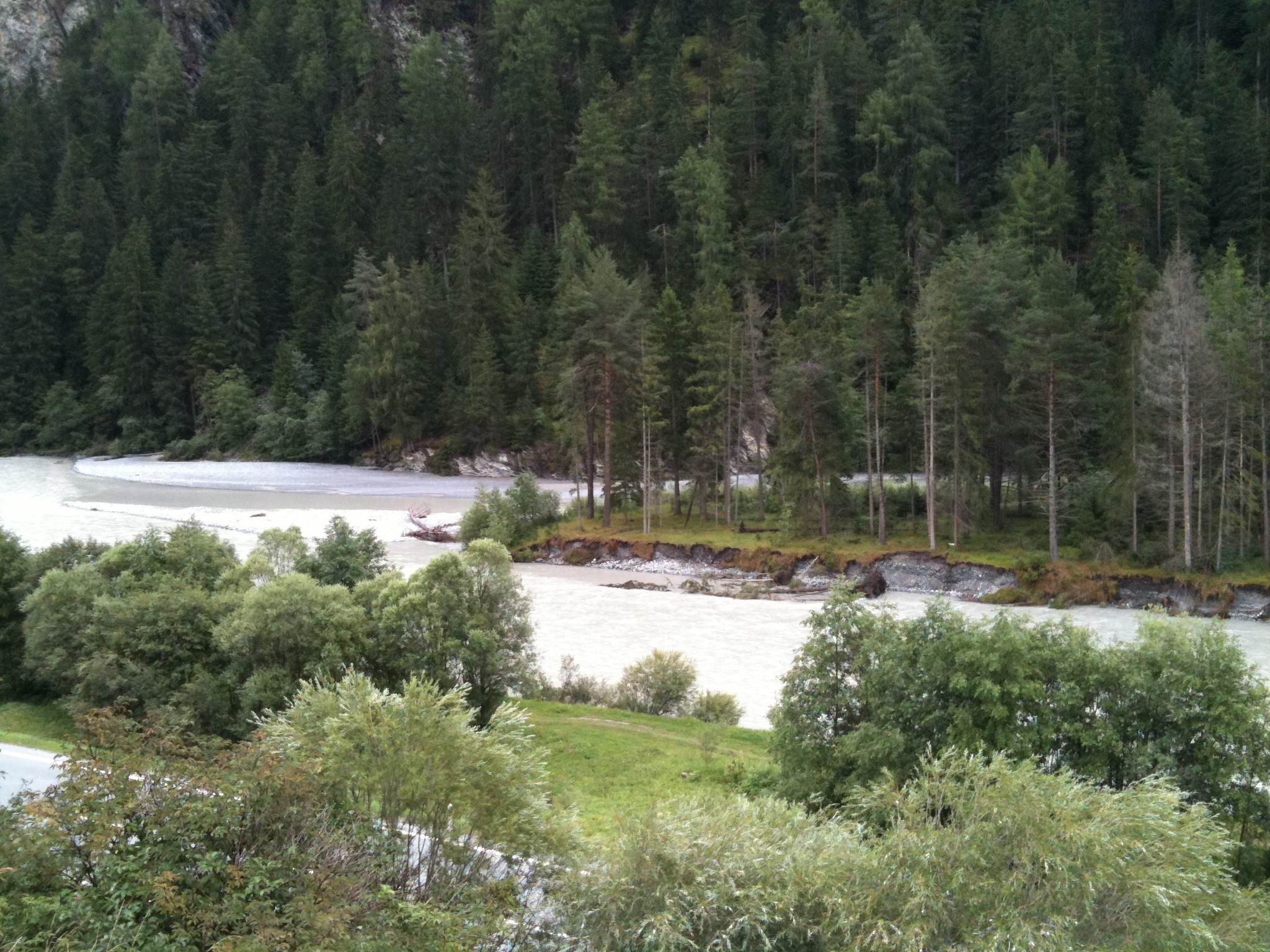 Der Inn bei Strada im Engadin (Gemeinde Tschlin)